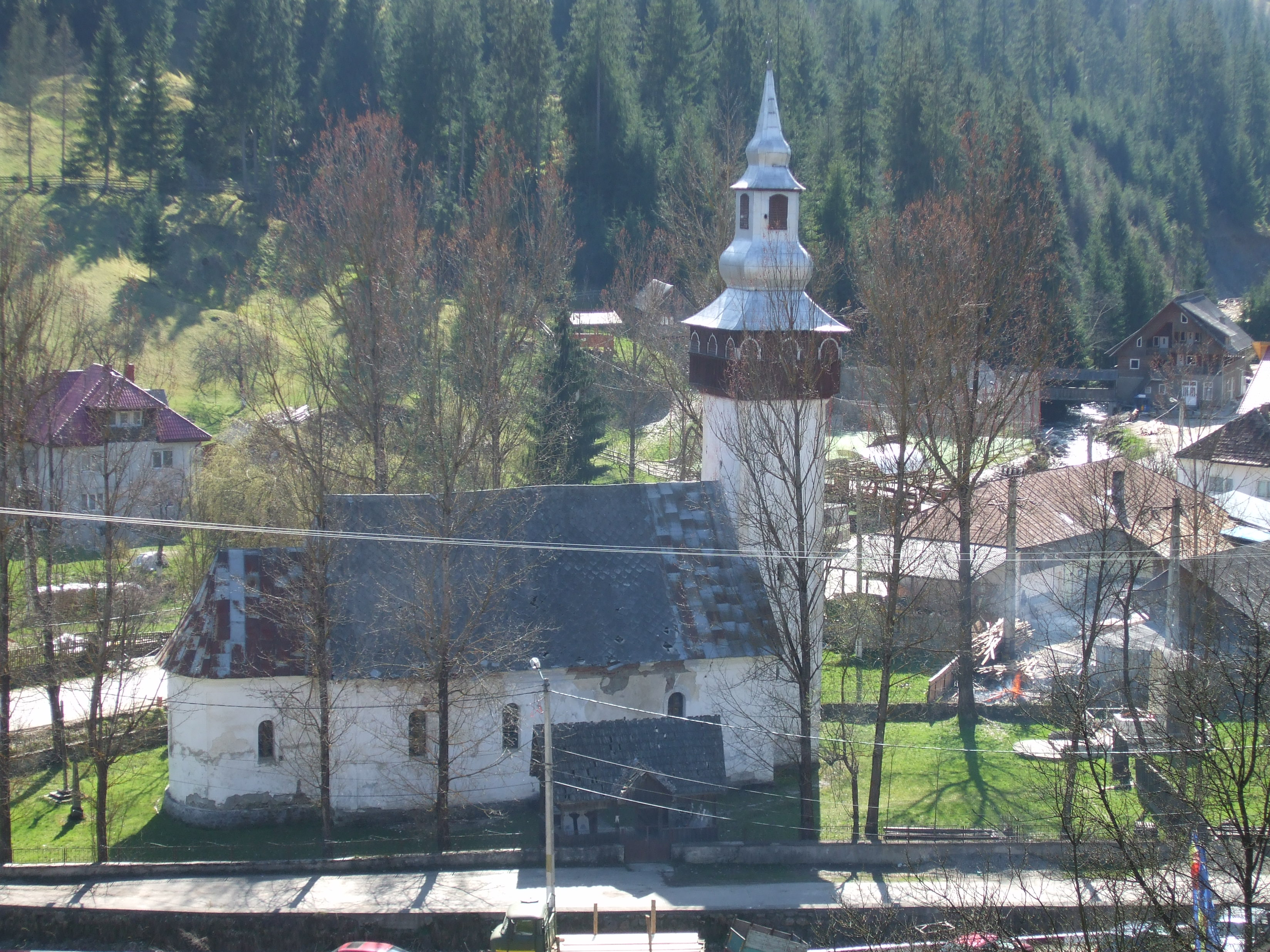 Vechea biserică din comuna Horea , jud.Alba - construită în 1842 şi folosită neîntrerupt de credincioşi pînă în 4 iulie 2007.